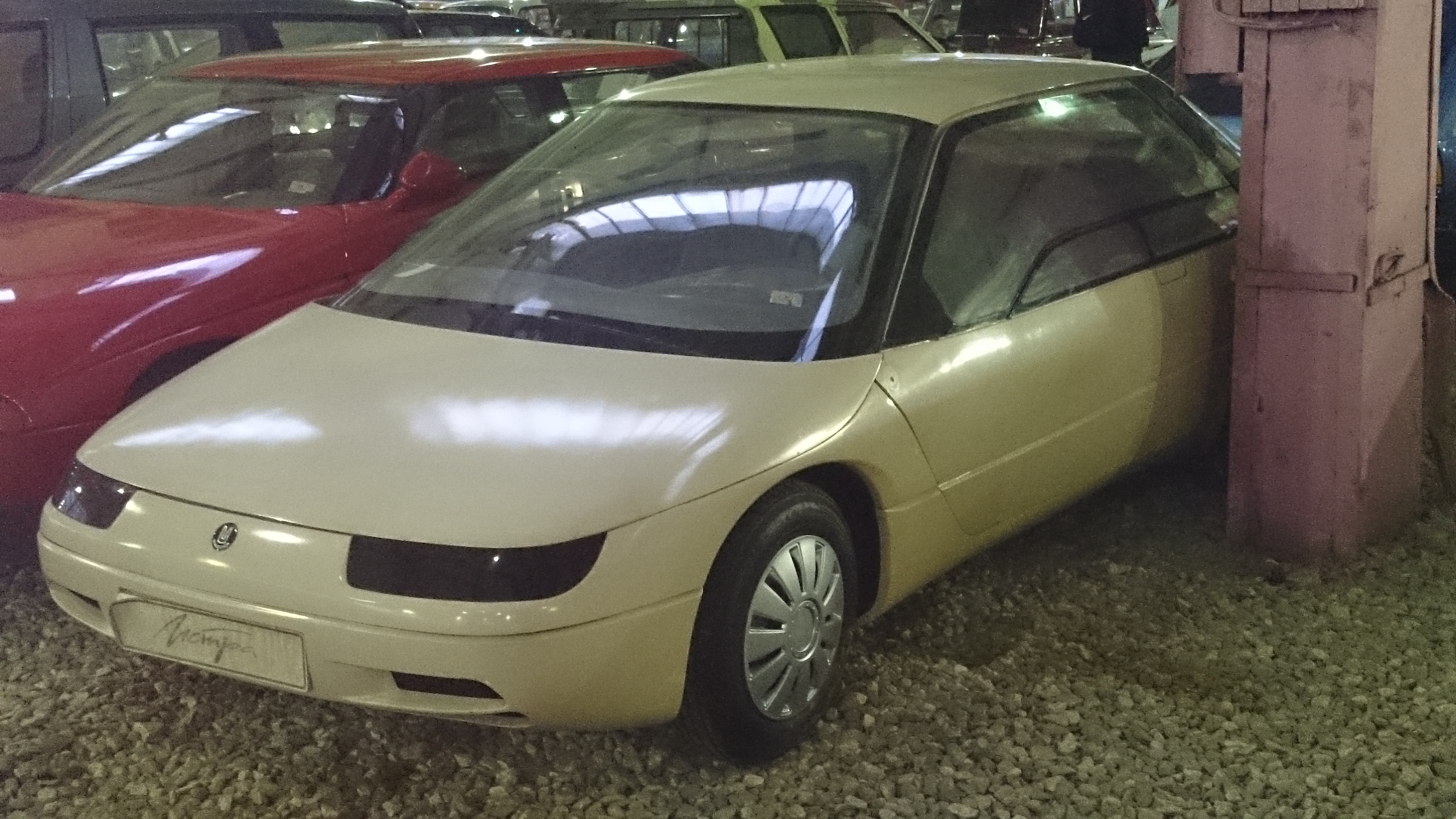 "Москвич-2144 Истра" в музее ретро-автомобилей.